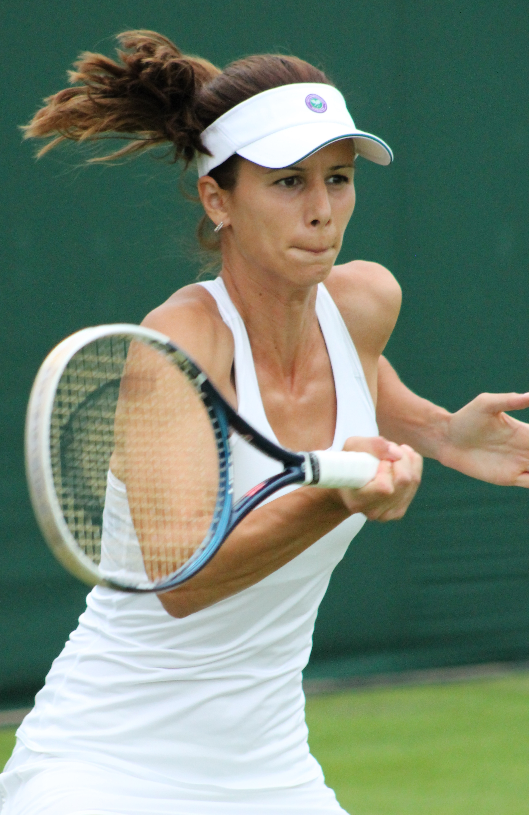 Pironkova WM14 (6)